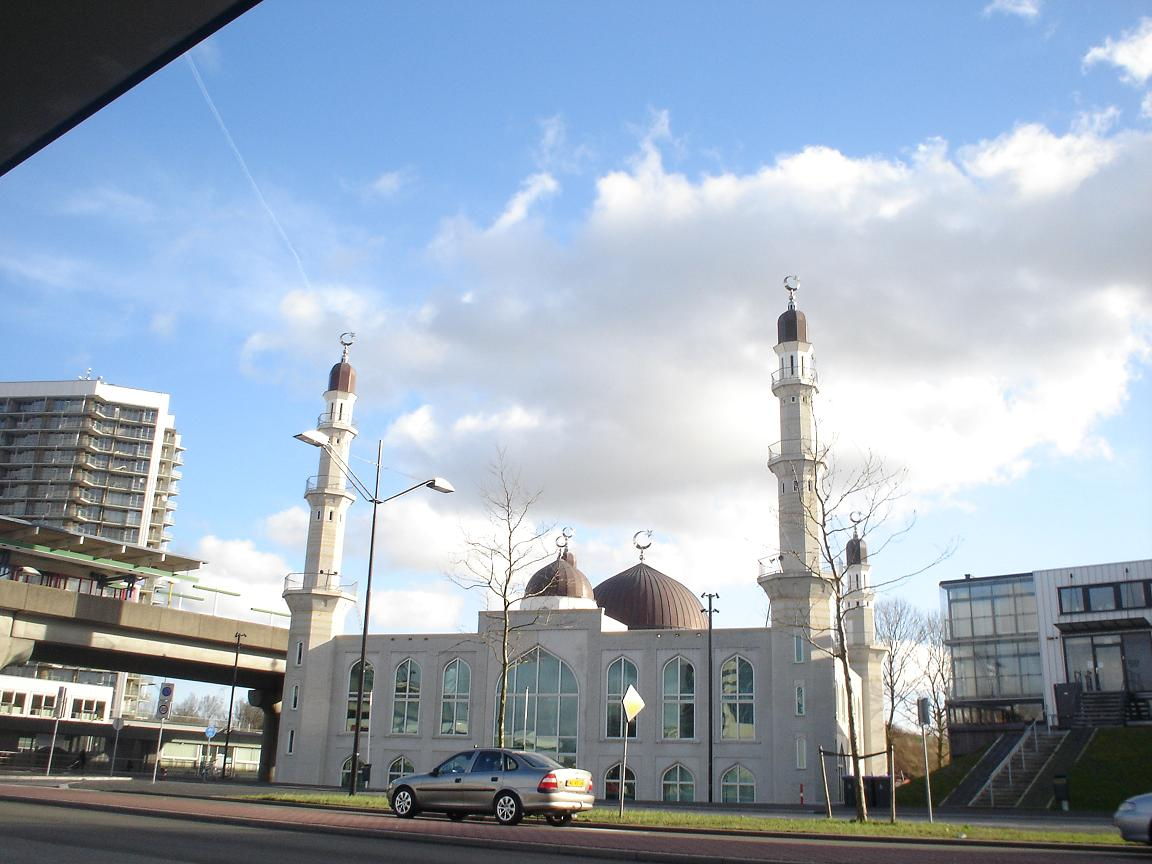 La foto muestra la mezquita del barrio bijlmermeer, ubicada al lado de la estación Kraaiennest en la ciudad de Amsterdam